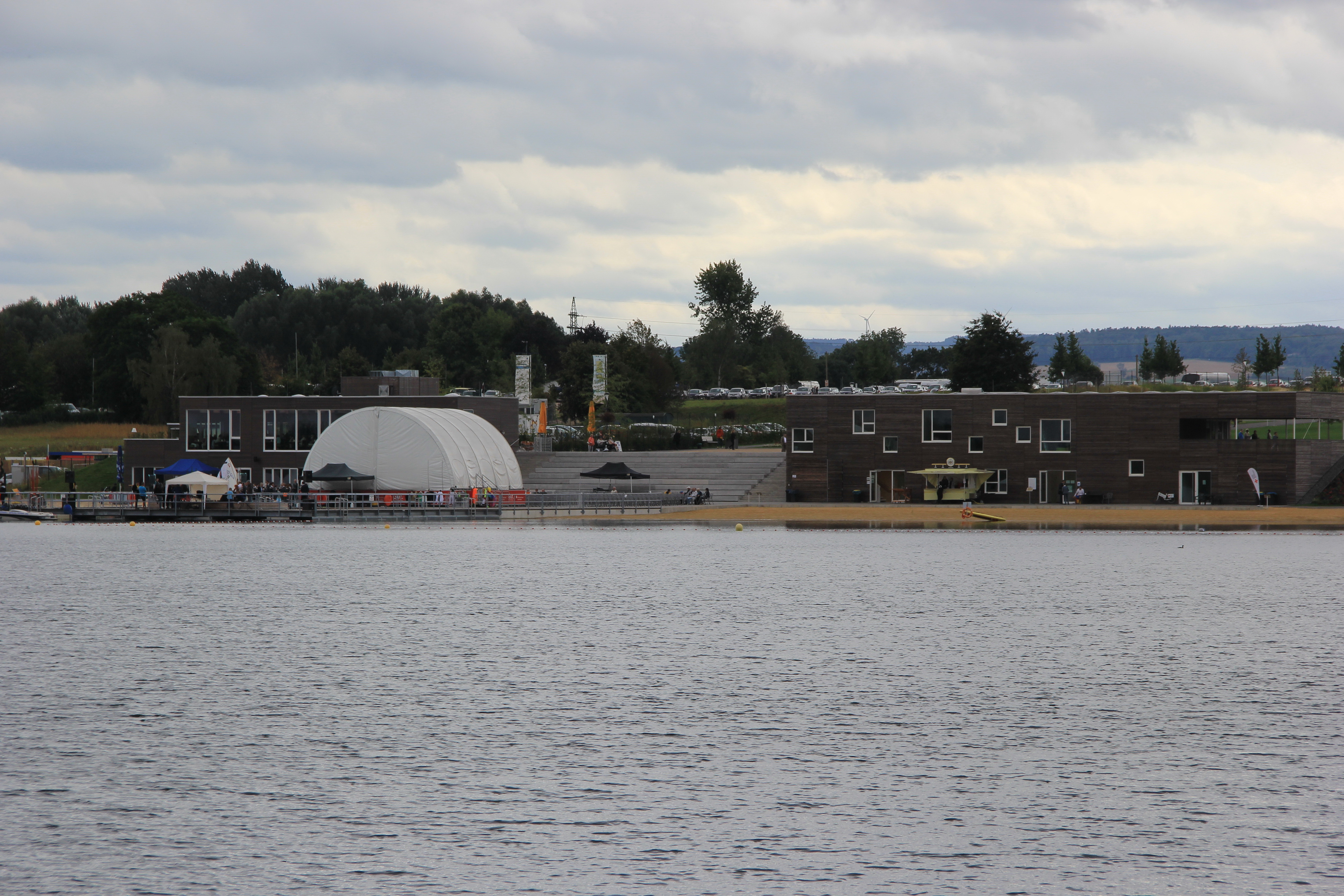 Zülpich, Landesgartenschau 2014 (Seepark); Blick auf die Seebühne, den Lago Beach Zülpich und das Seebad-Gebäude.